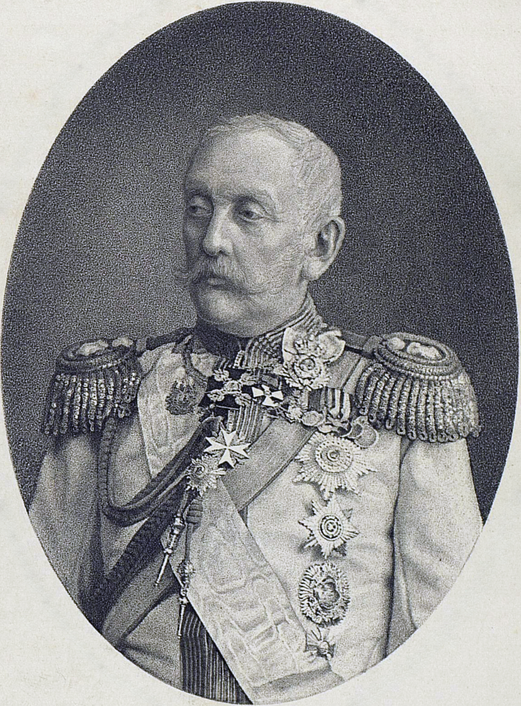 Суворов Александр Аркадьевич, 1870-е годы